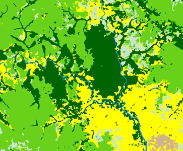 Observation Spatiale des Forêts Tropicales Bassin du Congo